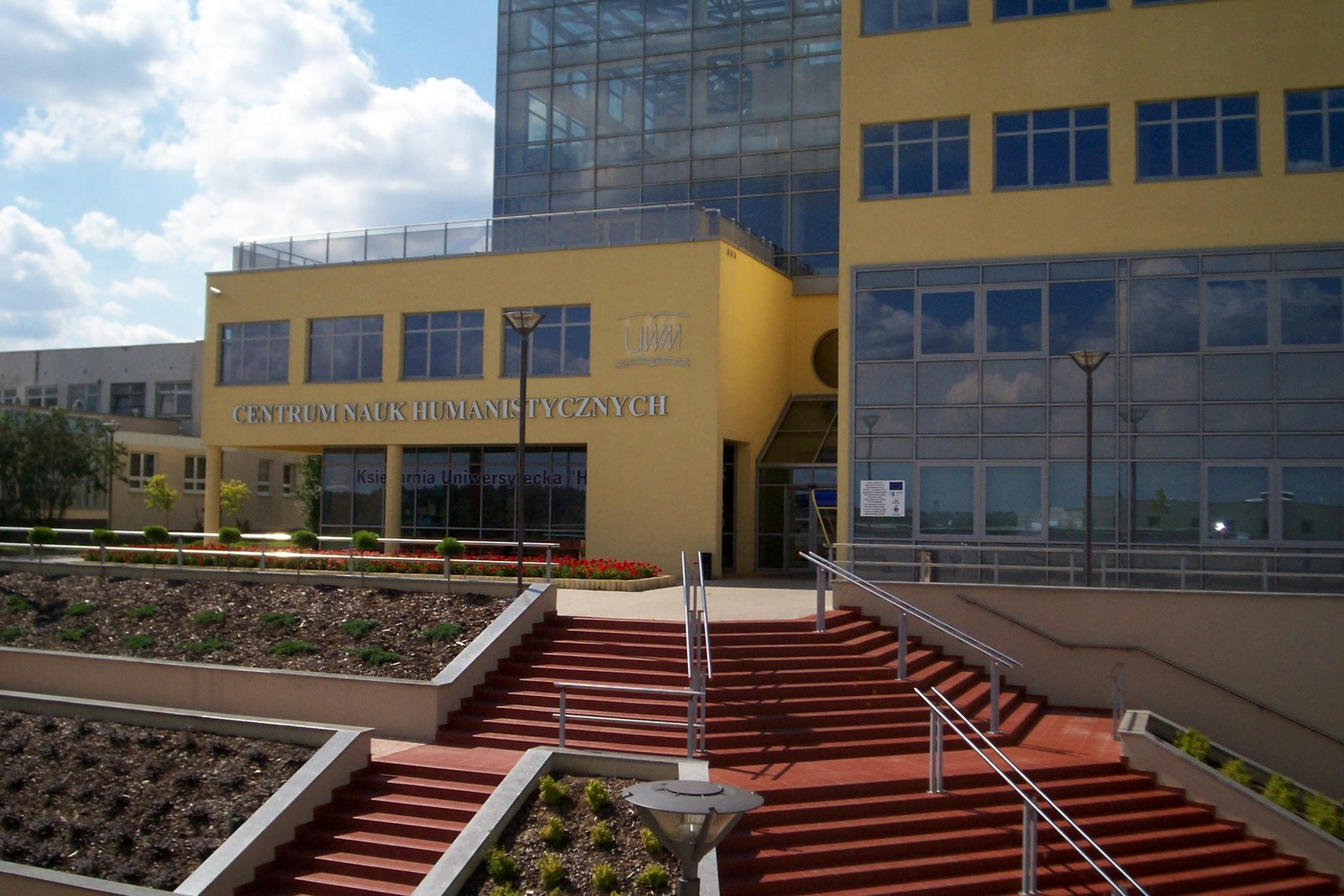 Budynek Wydziału Humanistycznego. Human.